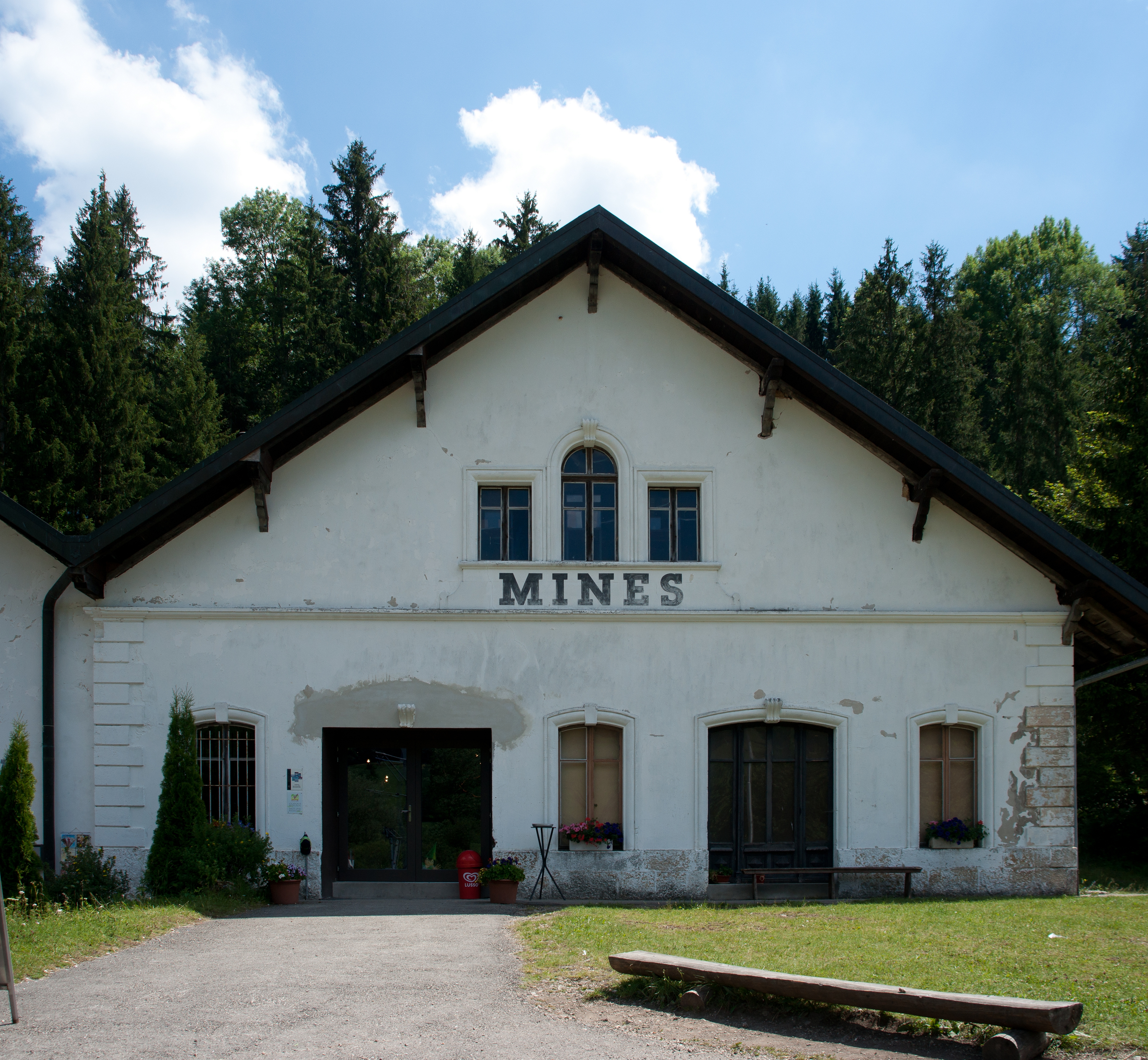 Travers - Mines d'asphalte de la Presta.